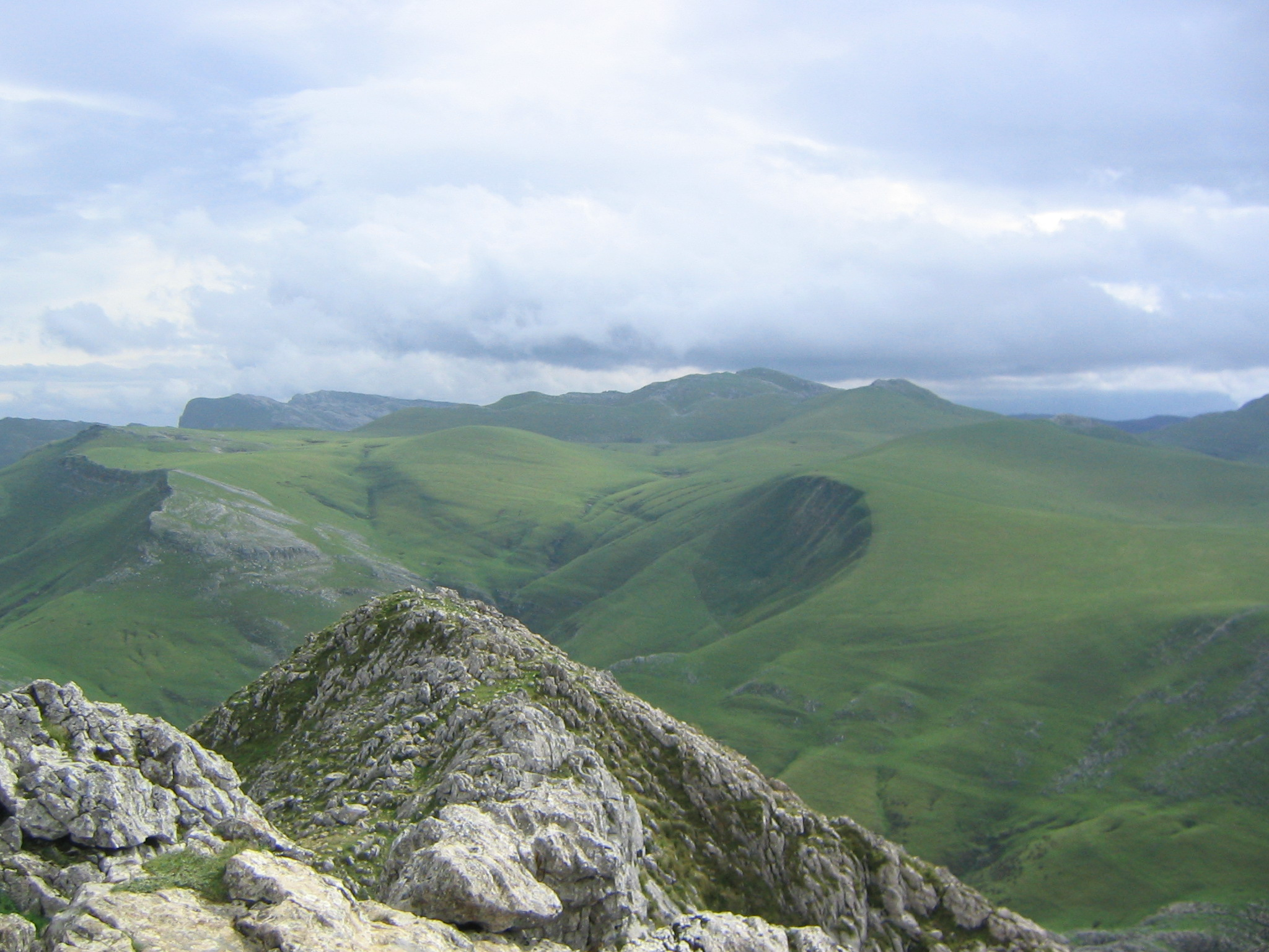 Campas de Aralar desde el Txindoki, Guipúzcoa, País Vasco, España.